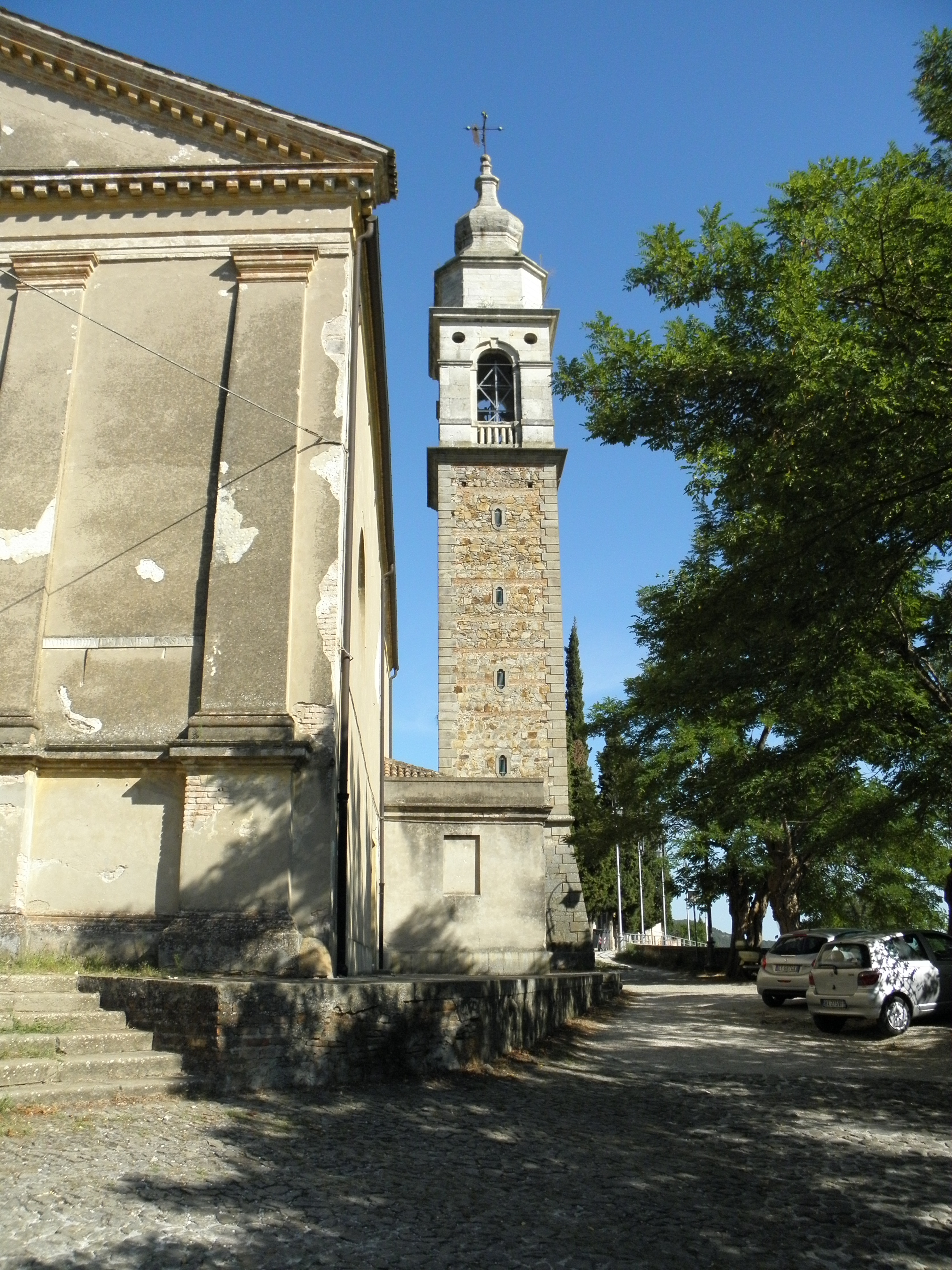 Galzignano Terme, il campanile dell'antica chiesa di Santa Maria Assunta.